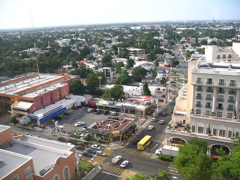 Vista de Merida Yucatan Mexico